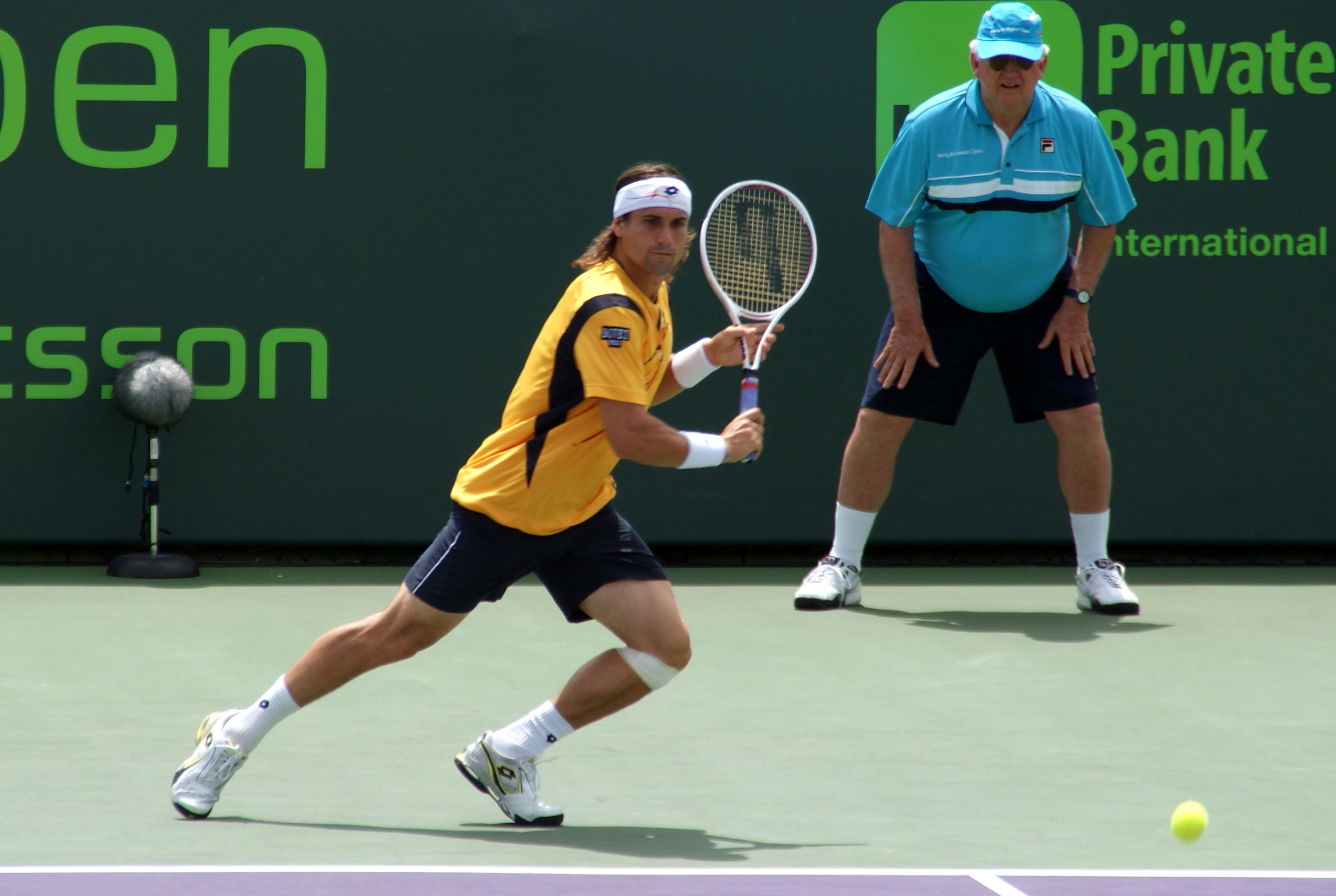 David Ferrer agains John Isner in Miami, 2009